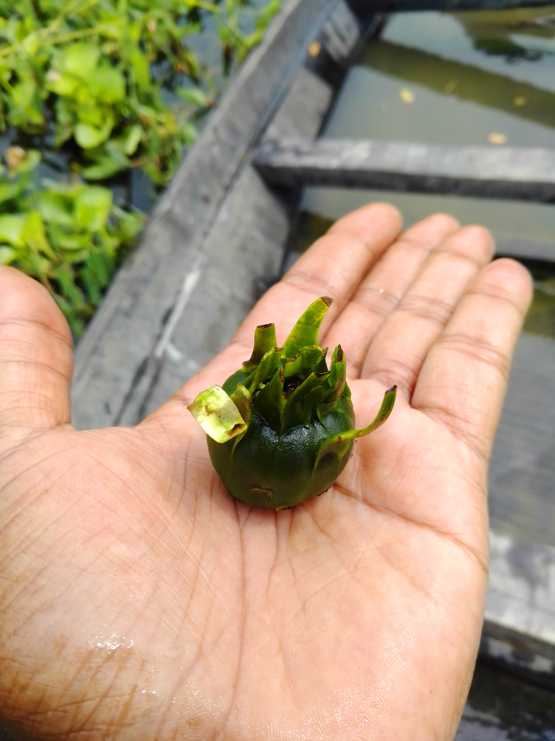 শাপলার ফল (ঢ্যাপ) - Water Lily Fruit. আলোকচিত্র : আহমেদ আলী শাহ্ শাওন।